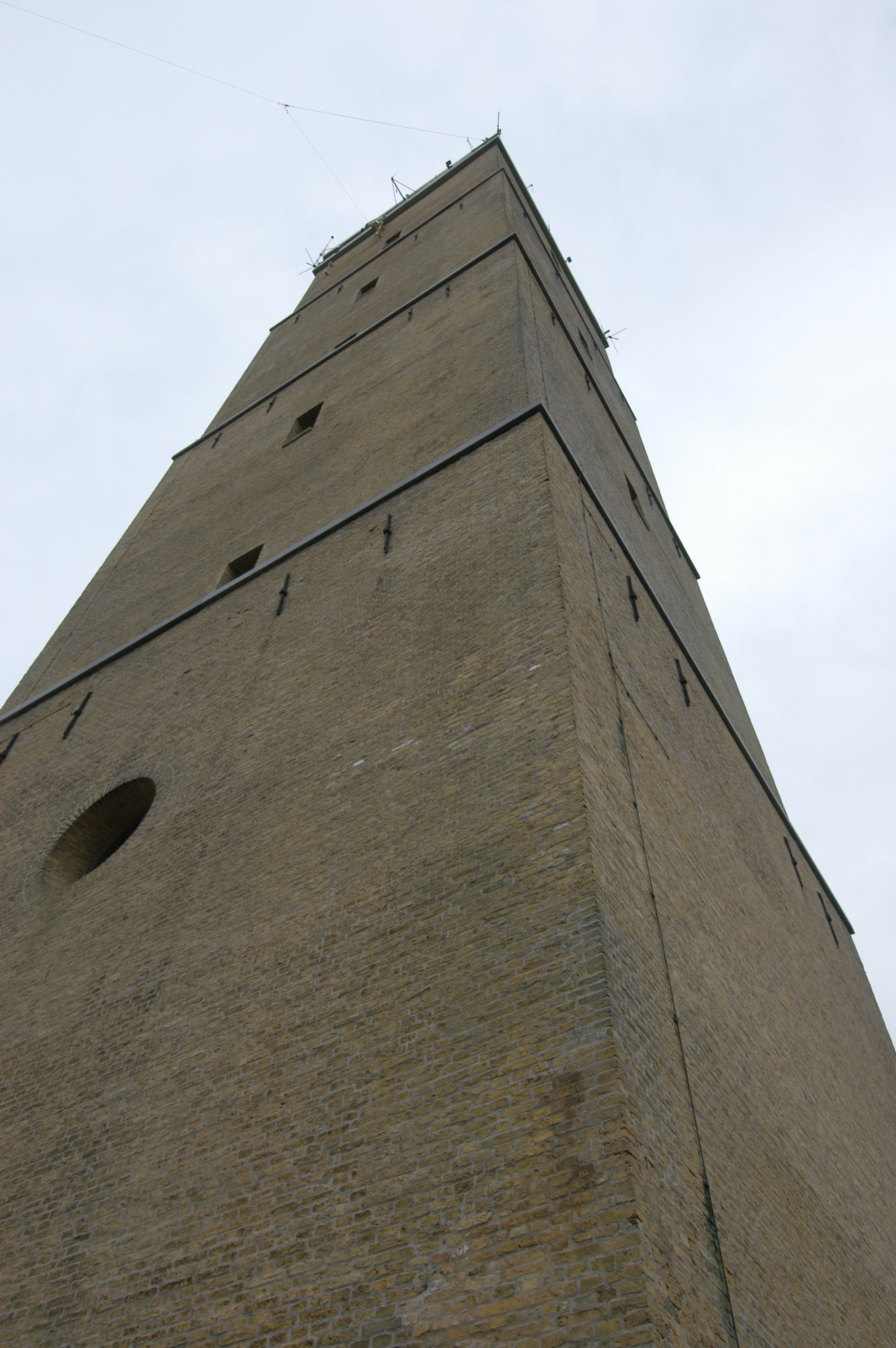 Brandaris van onderaf gezien